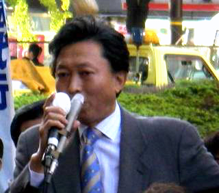 Hatoyama,Yukio (Japanese politician)